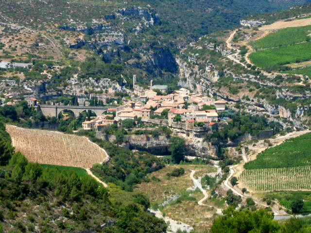 Minerve im Languedoc (Frankreich)